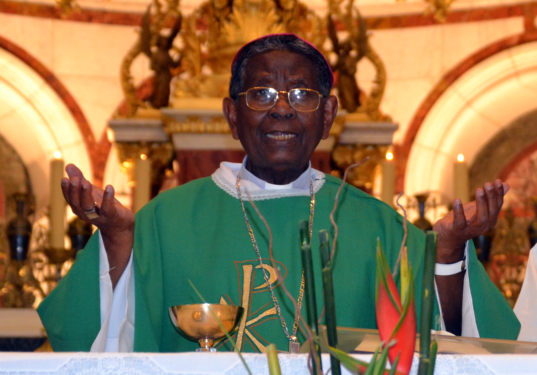 Célébration de la messe pour la clôture du du "zaikabe 16", à la basilique Notre-Dame de la Garde (Marseille). Et le passage à l'entrée de la "porte sainte" pour l'année de la miséricorde. Malagasy: Fandalovan'i Mgr Malo Michel teto Marseille tamin'ny famaranana ny zaikabe juin 2016 niarahany tamin'ny solontenan'i Montpellier - Avignon - Nice - Marseille. Fa nidirana niaraka taminy ihany koa ny "porte sainte" ho fankalazana ny "Taonan'ny famindra-po".